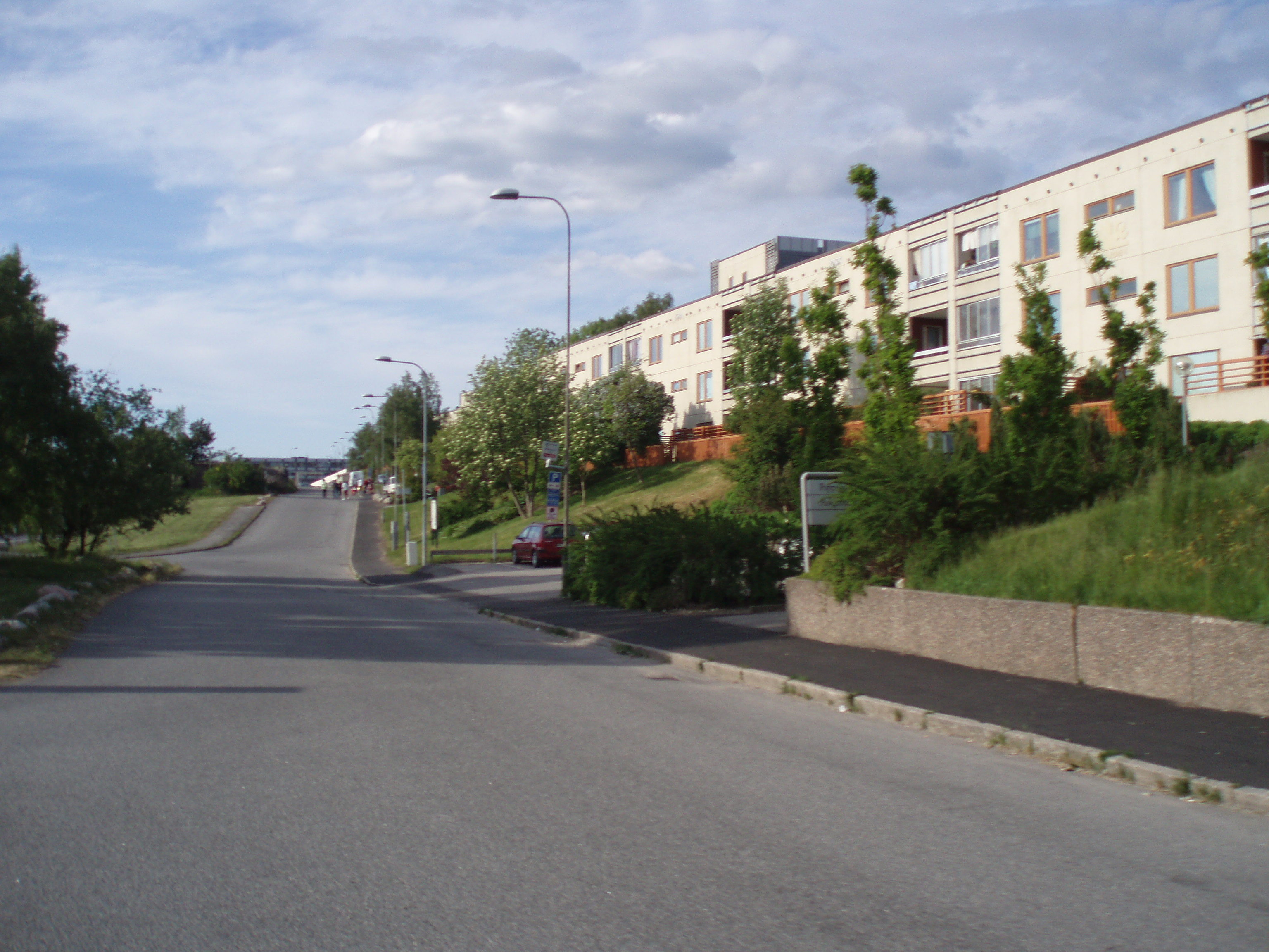 Peppargatan i Gårdsten norr om Göteborg